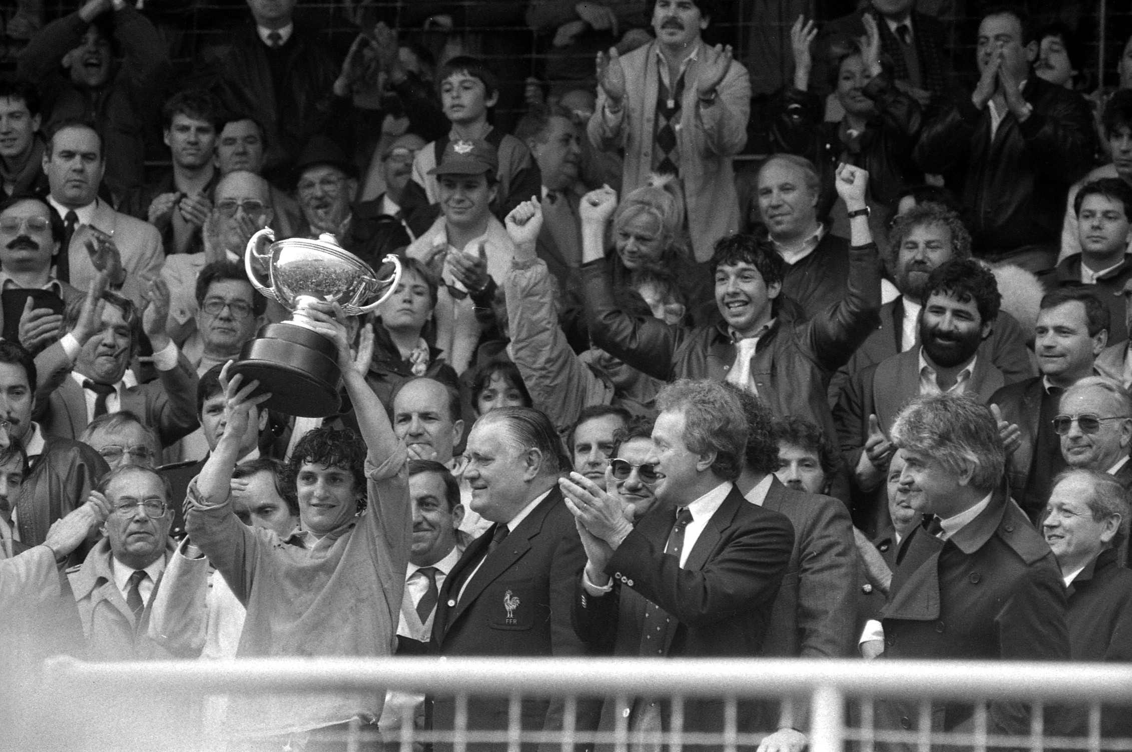 Stade Albert Domec à Carcassonne. Le14 Avril 1985. Vue du capitaine de Narbonne qui soulève la coupe en tribune présidentielle.